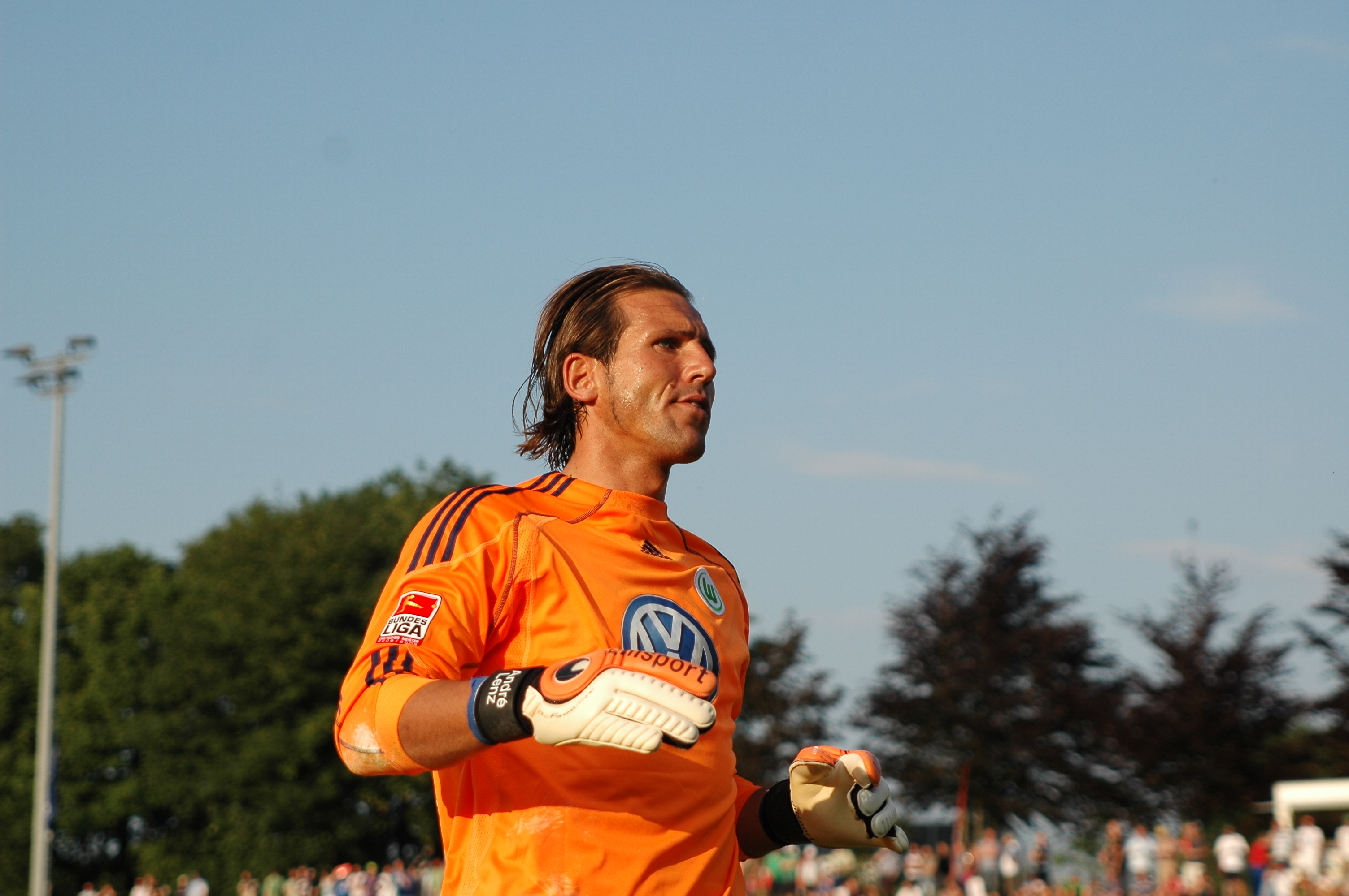 André Lenz